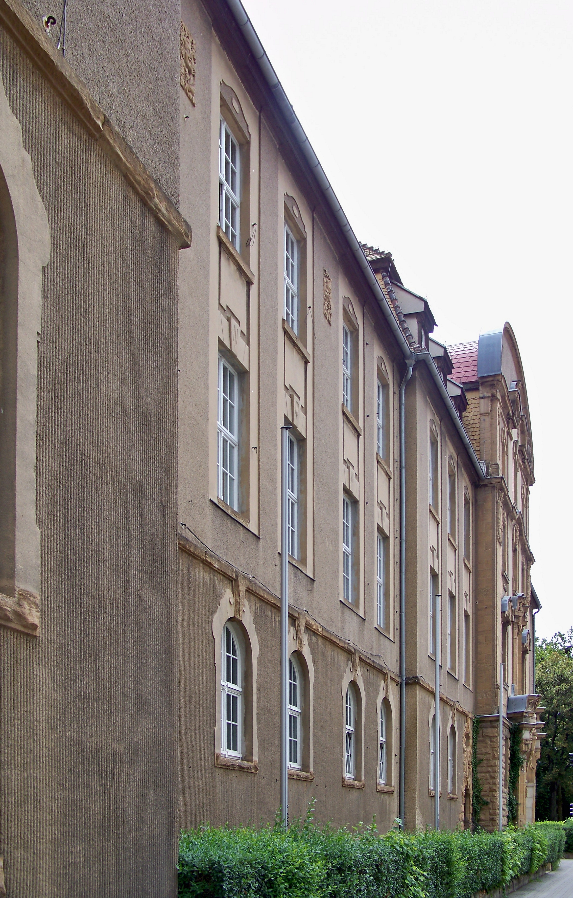 Amtsgericht in Weißenfels, Friedrichsstraße 18